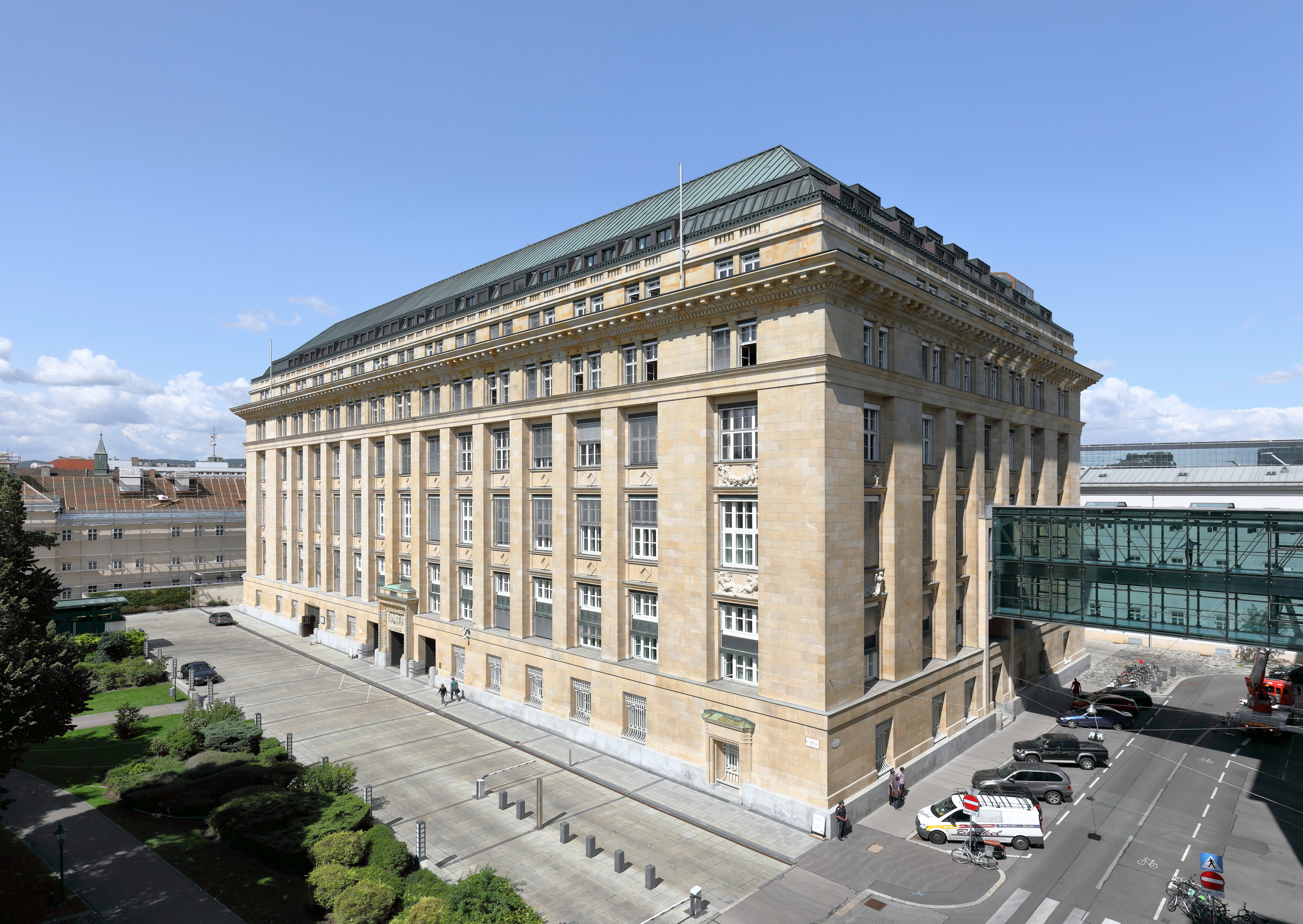 Das Hauptgebäude der Österreichischen Nationalbank am Otto Wagner-Platz 3 im 9. Wiener Gemeindebezirk Alsergrund. Das Bauwerk war ursprünglich nach Plänen des Architekten Leopold Bauer ab 1912/13 als Druckereigebäude der Österreichisch-Ungarischen Bank und als Teil eines großen Bankgebäudekomplexes auf den Gründen der demolierten Alser-Kaserne errichtet worden. Wegen dem 1. Weltkrieg und dessen Folgen wurde nur der Rohbau fertiggestellt. 1923 entschied die Österreichische Nationalbank, dieses Gebäude zum Hauptsitz des Instituts umzubauen und beauftragte dazu die Architekten Rudolf Eisler und Ferdinand Glaser.